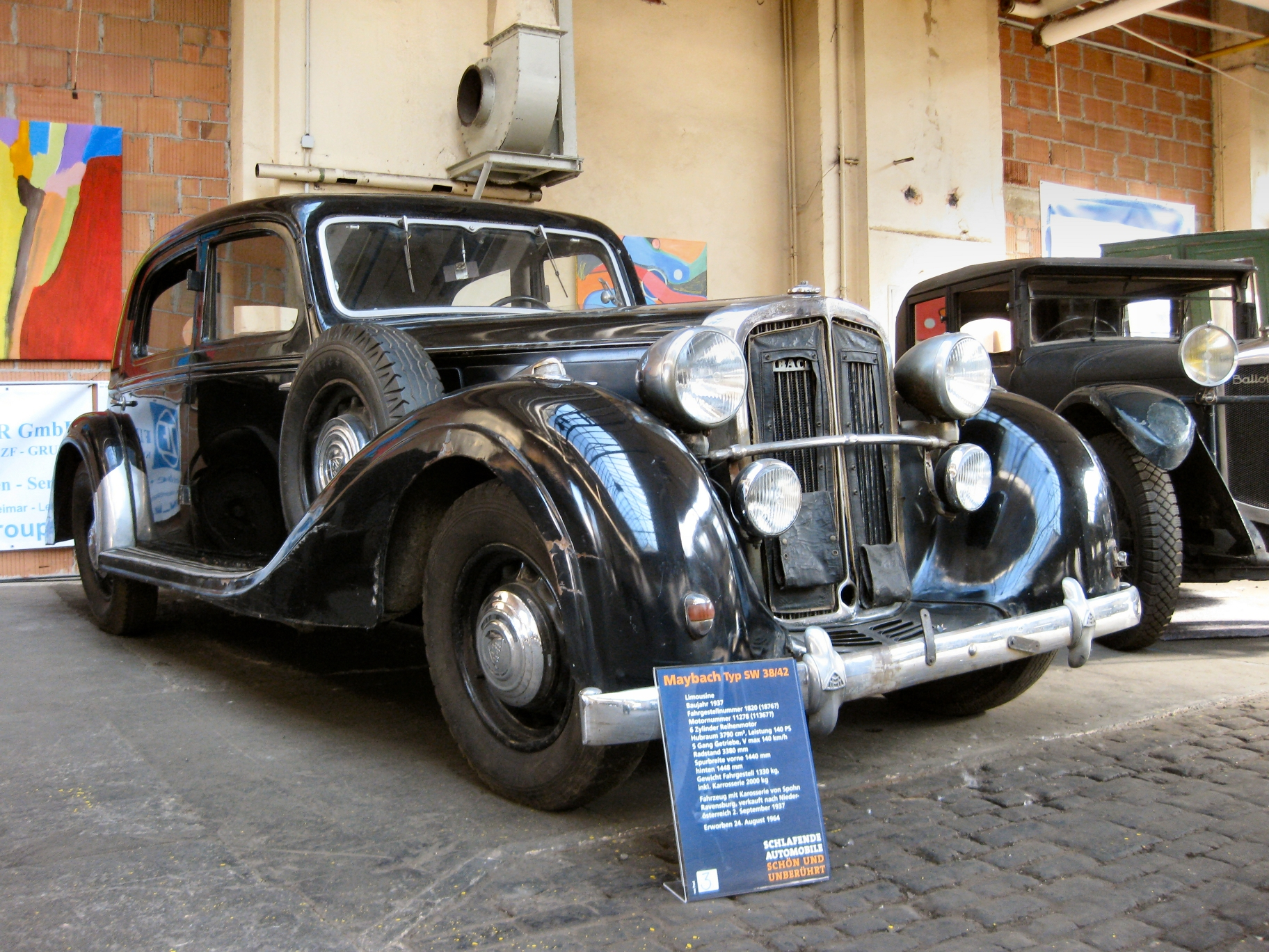 Maybach SW 38/42 (1937) (Country of origin: Germany) aus Sammlung Schlumpf